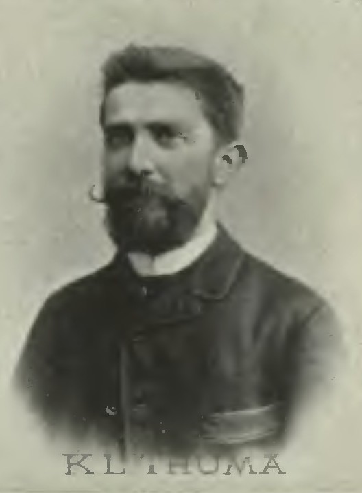 Portrét – Karel Ladislav Thuma (1853 - 1917), Český malíř a ilustrátor.